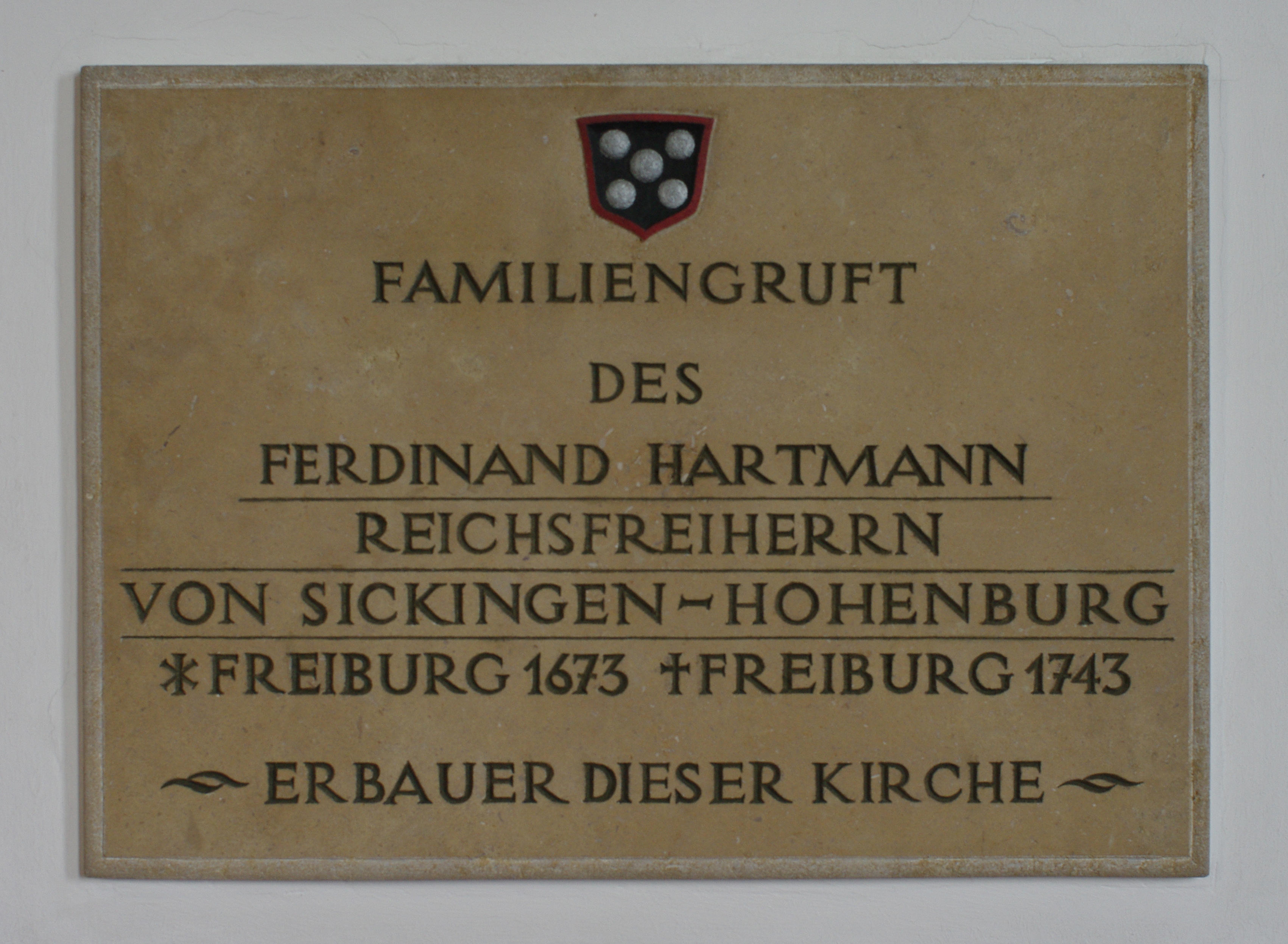 Gedenktafel Familiengruft von Ferdinand Hartmann Reichsfreiherrn von Sickingen-Hohenburg